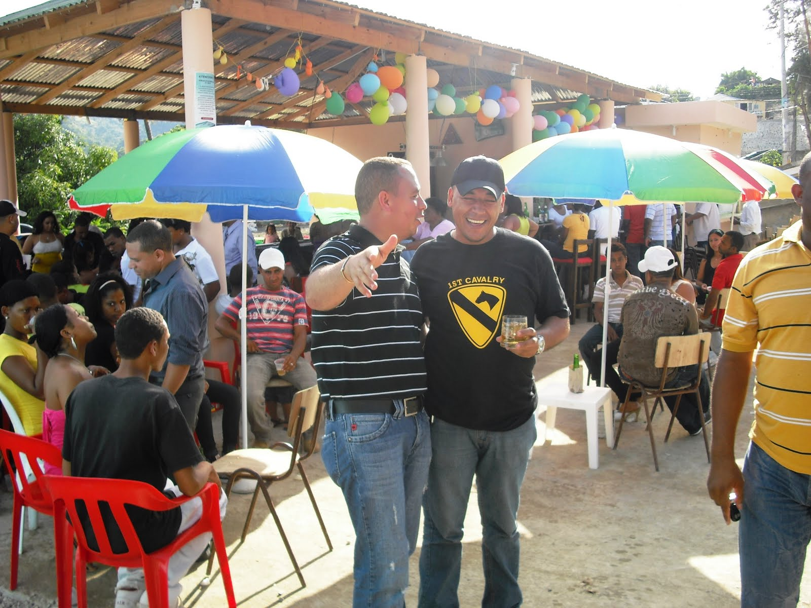 La poblacion de Arroyo Cano